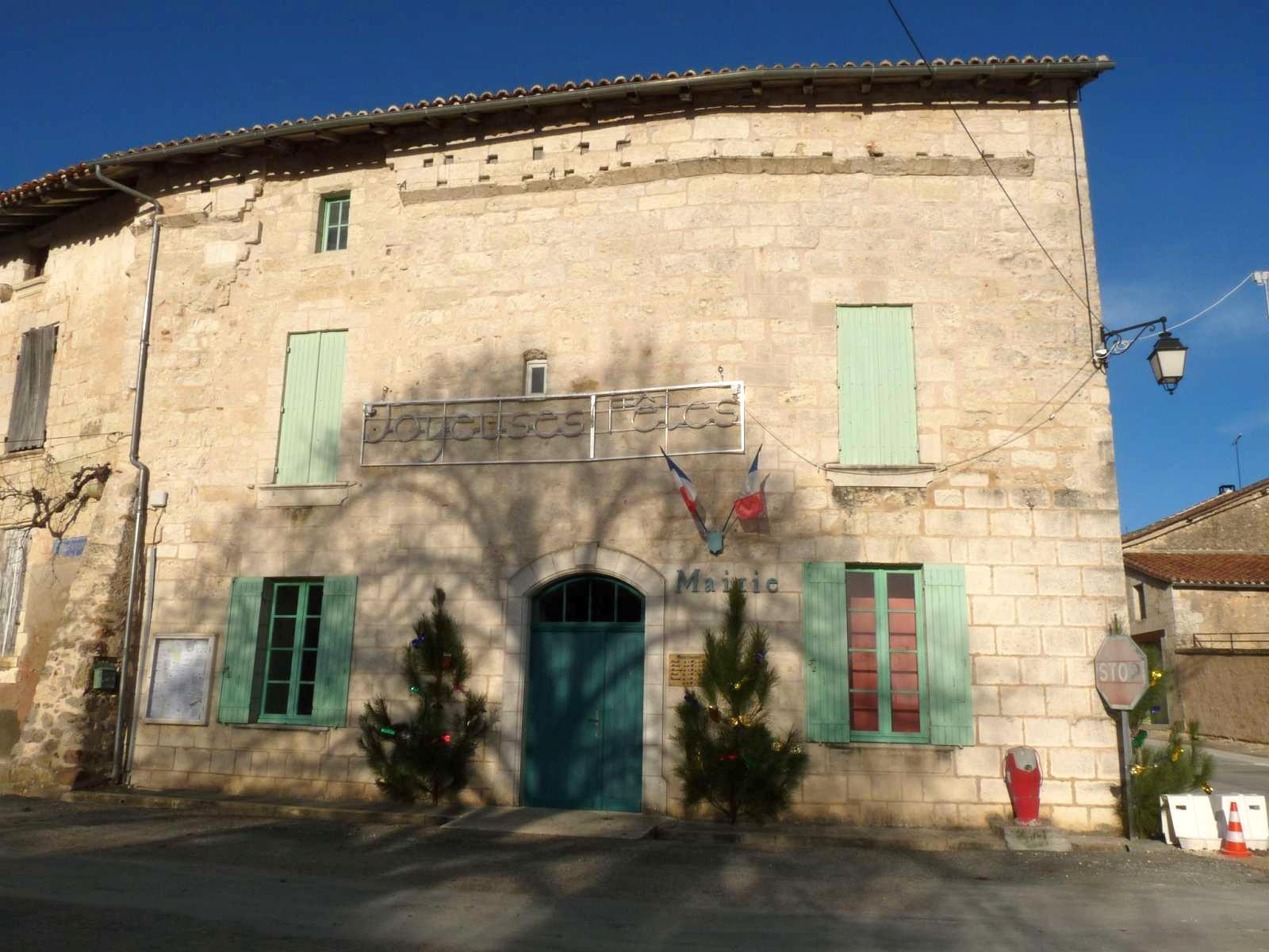 mairie de Vanxains, Dordogne, France